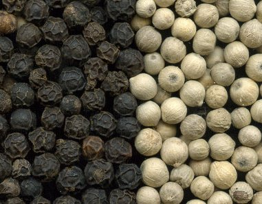 Πιπέρι Cropped and flipped by myself from GFDL image on German Wikipedia [1].